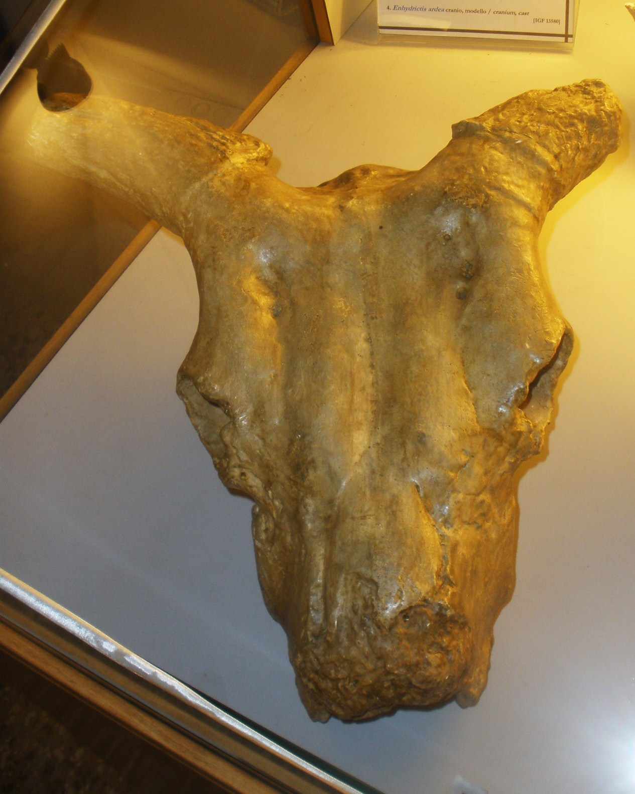 Fossil of Leptobos, an extinct mammal- Took the picture at Museo di Paleontologia di Firenze